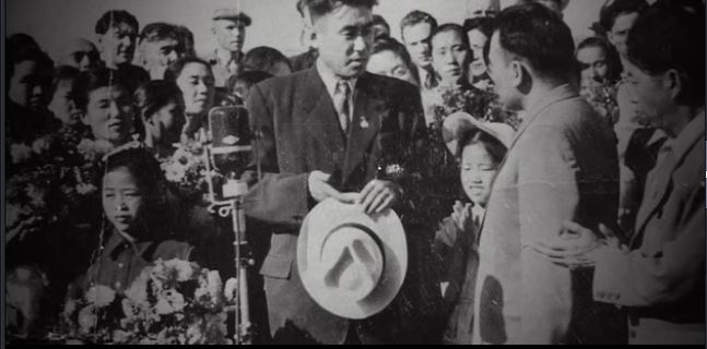 1955년 북한문화사절단 대표로 해외순발